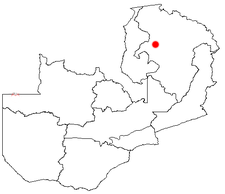 Lage von Luwingu in Sambia